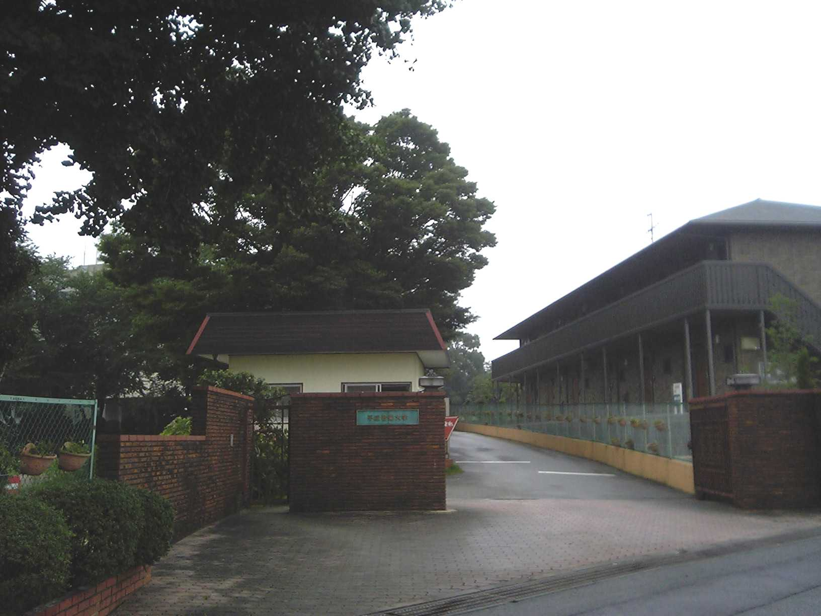 平成音楽大学 (2007年7月7日撮影)